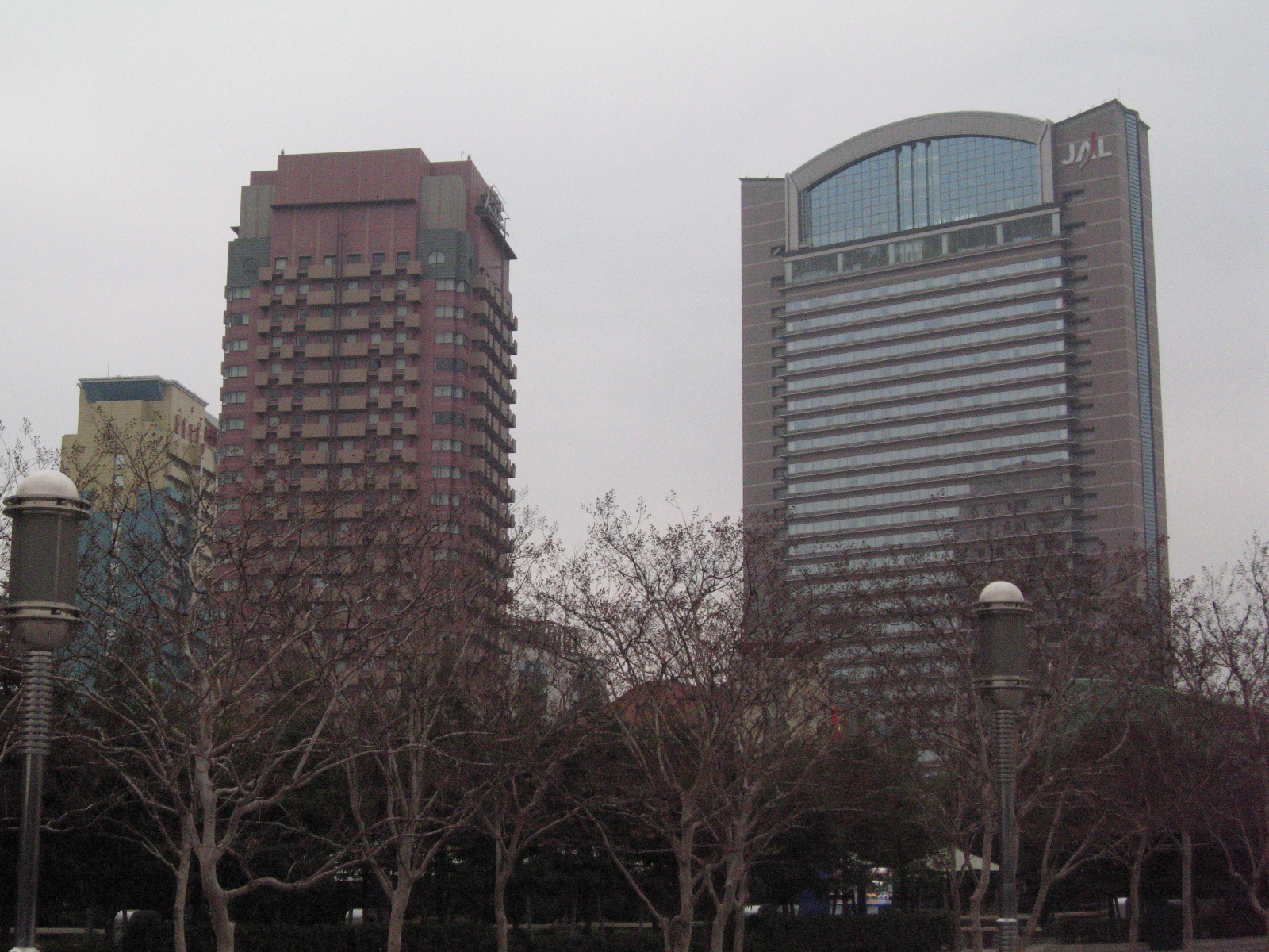 Universal CityWalk, Osaka, Kansai Region.